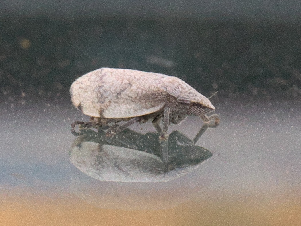 Lepyronia gibbosa, Hill-Prairie Spittlebug, ID Confidence: 98